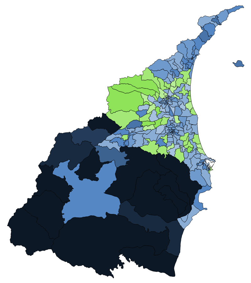 2018 宜蘭縣縣長選舉各里得票